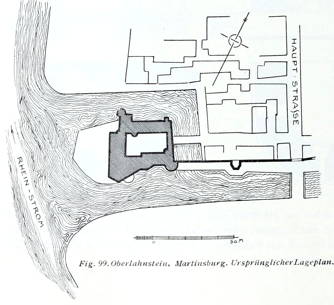 Oberlahnstein Martinsburg Ursprünglicher Lageplan